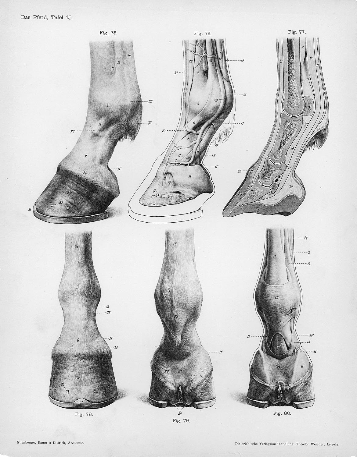 Animal anatomical engraving from Handbuch der Anatomie der Tiere für Künstler' - Hermann Dittrich, illustrator.